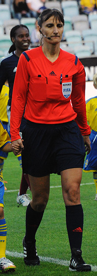 a_3_1578